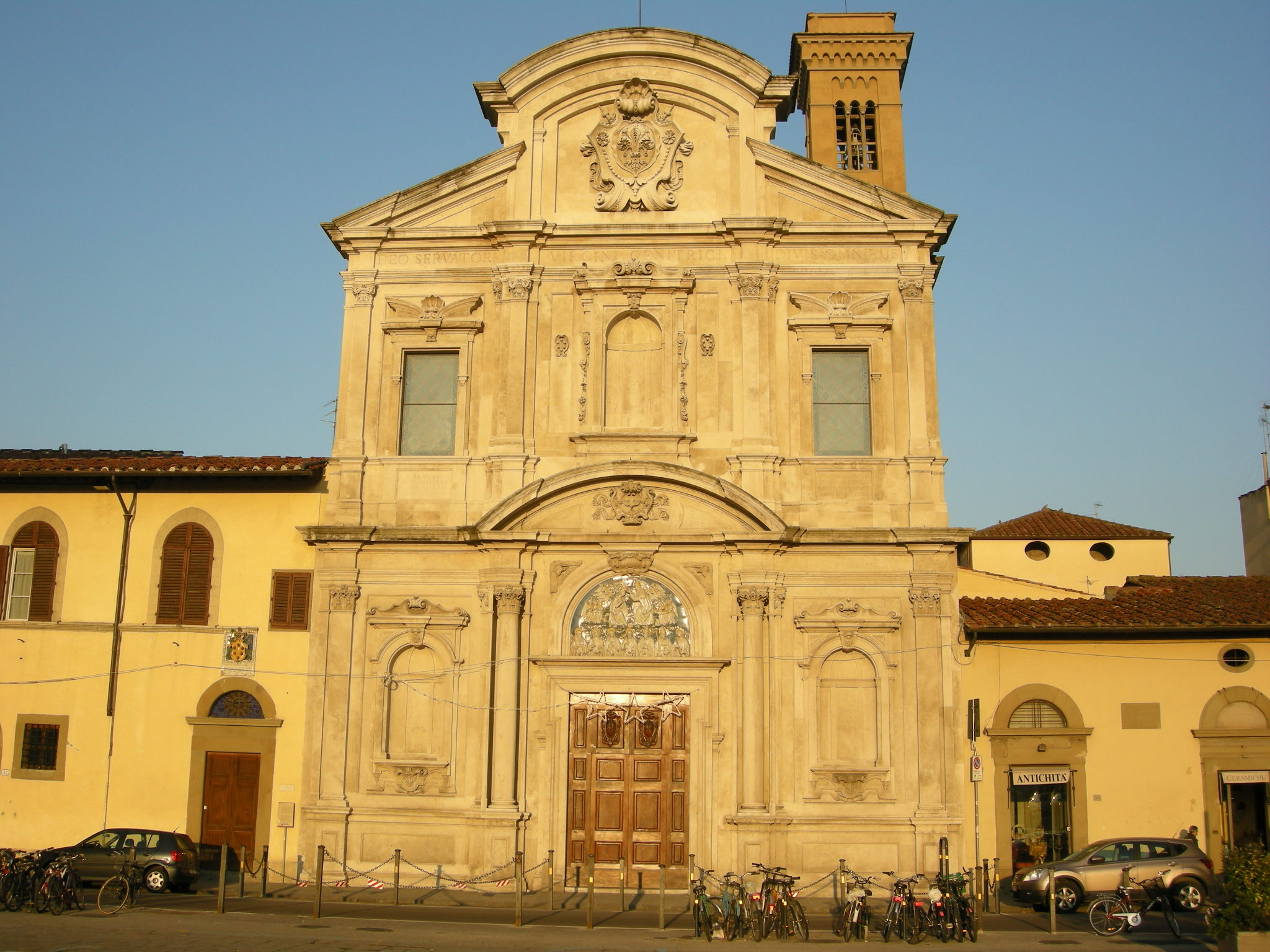 Chiesa di ognissanti, firenze